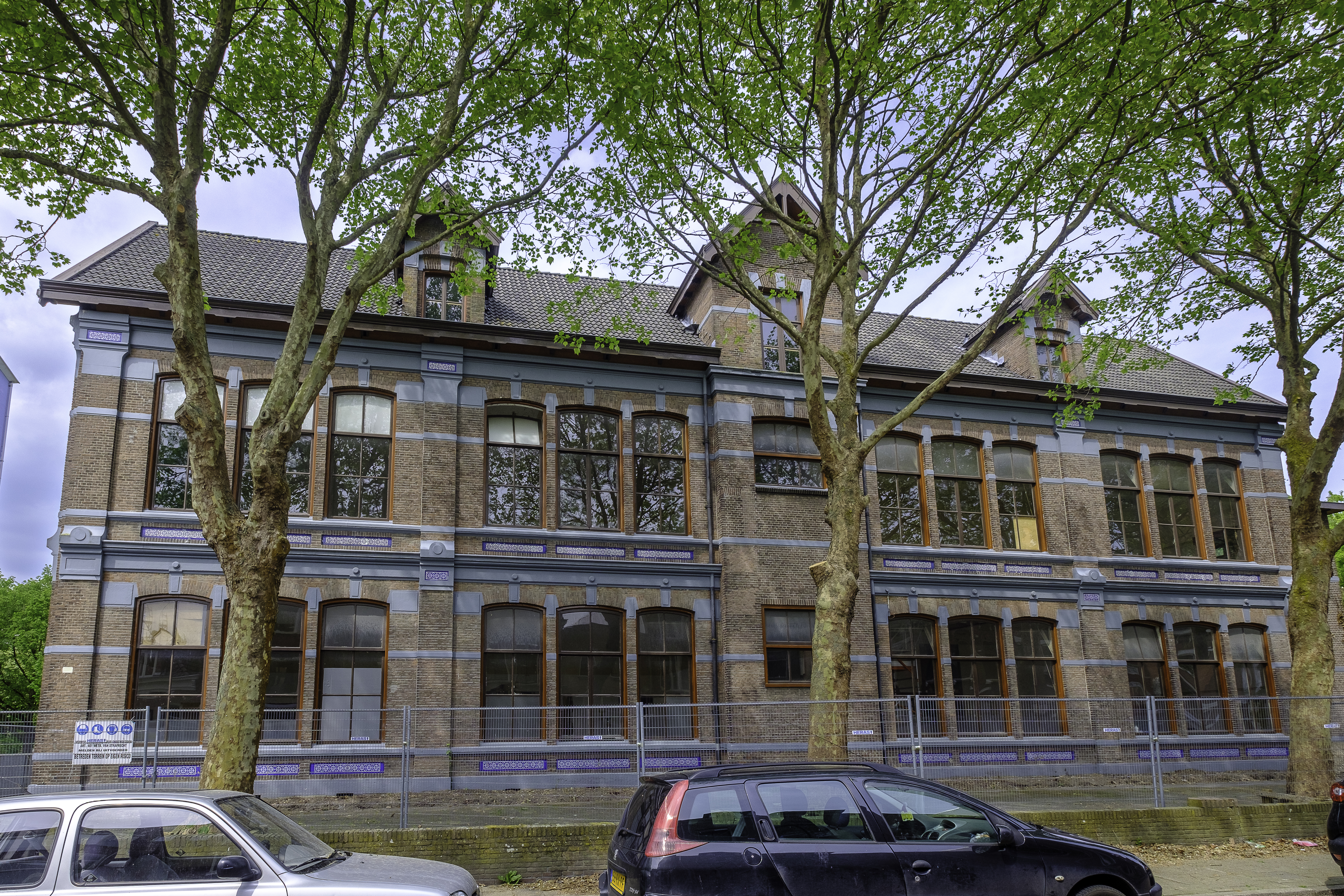 Voormalige openbare lagere school (Thorbeckeschool) aan de Boteringesingel 14 in Groningen.